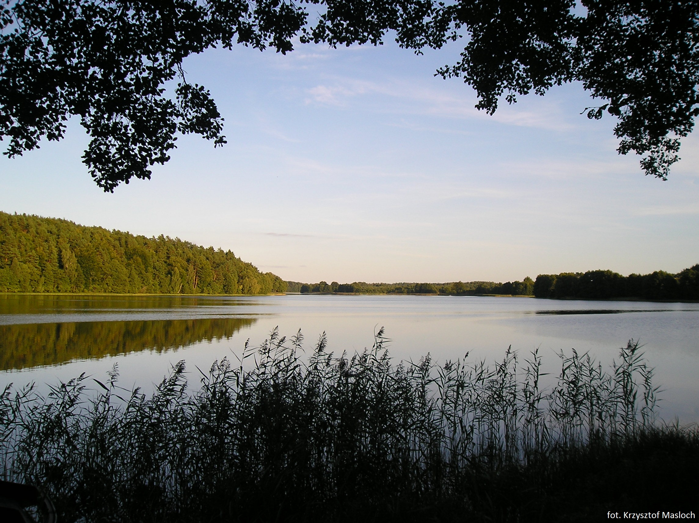 Jezioro Głębokie (Pietrzykowskie) w Świeszynie